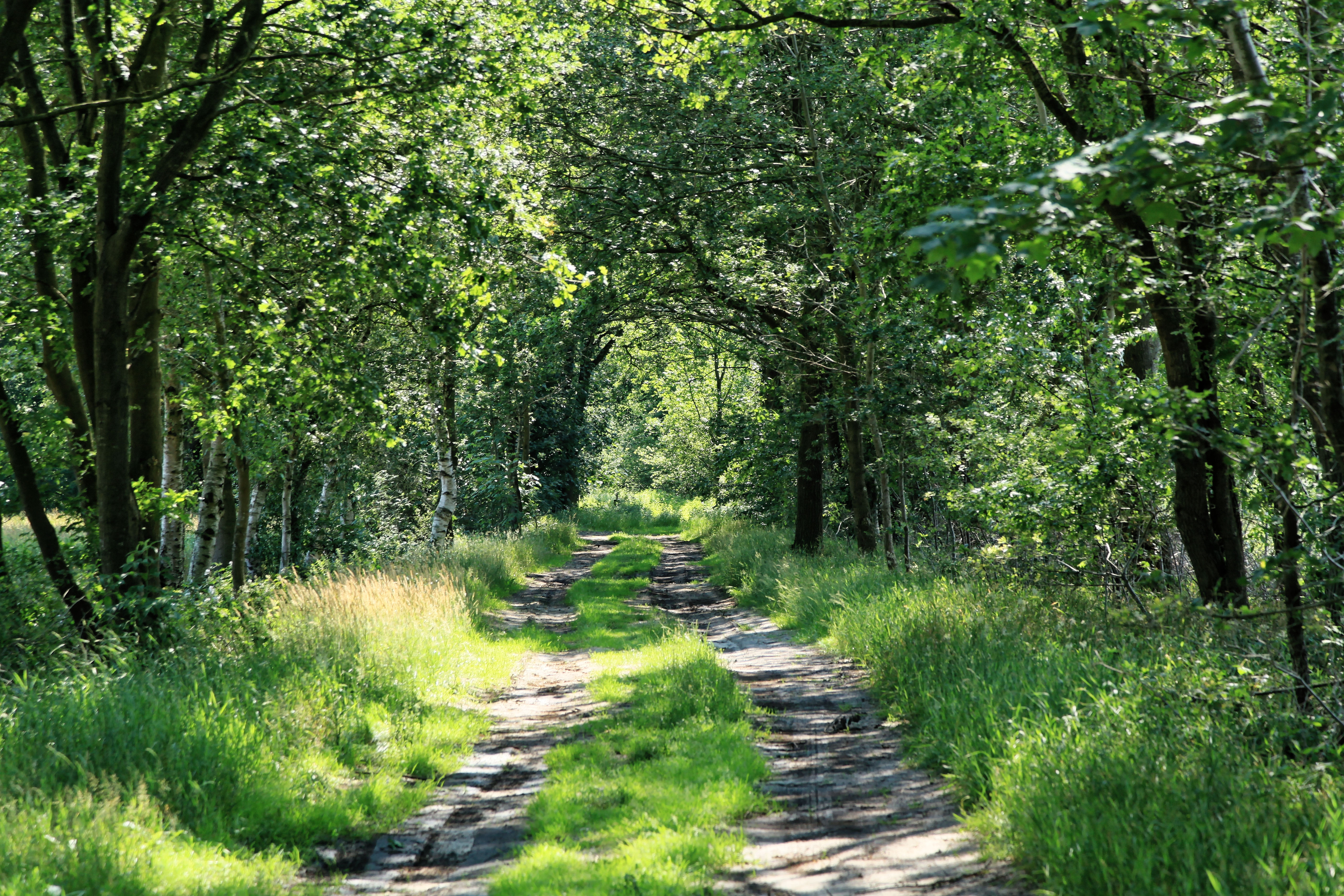 NSG Neuheeder Moor am Nankemannweg in Heede (Emsland)